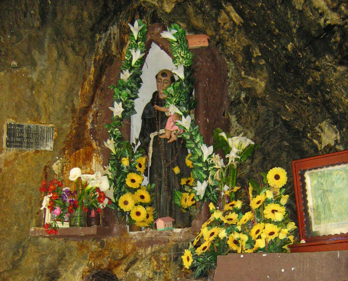 Santuario de San Antonio en California, Santander